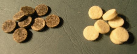 Na zdjęciu fabryczne przybitki z filcu nasączanego i "domowe" z filcu wełnianego